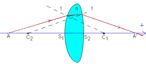 Schéma lentille constituée de deux dioptres sphériques (schéma personnel) Catégorie:Schéma de physique